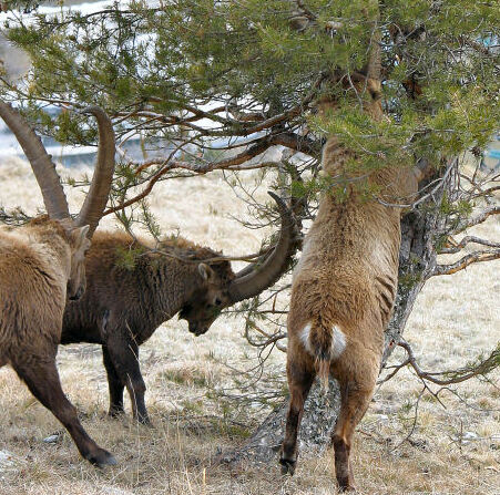 Bouquetin se dressant sur ses postérieurs pour atteindre les jeunes pousses d'arbre. Aussois, le 25/03/2006. Auteur : Aurélien LE METAYER. Licence : Creative Commons BY